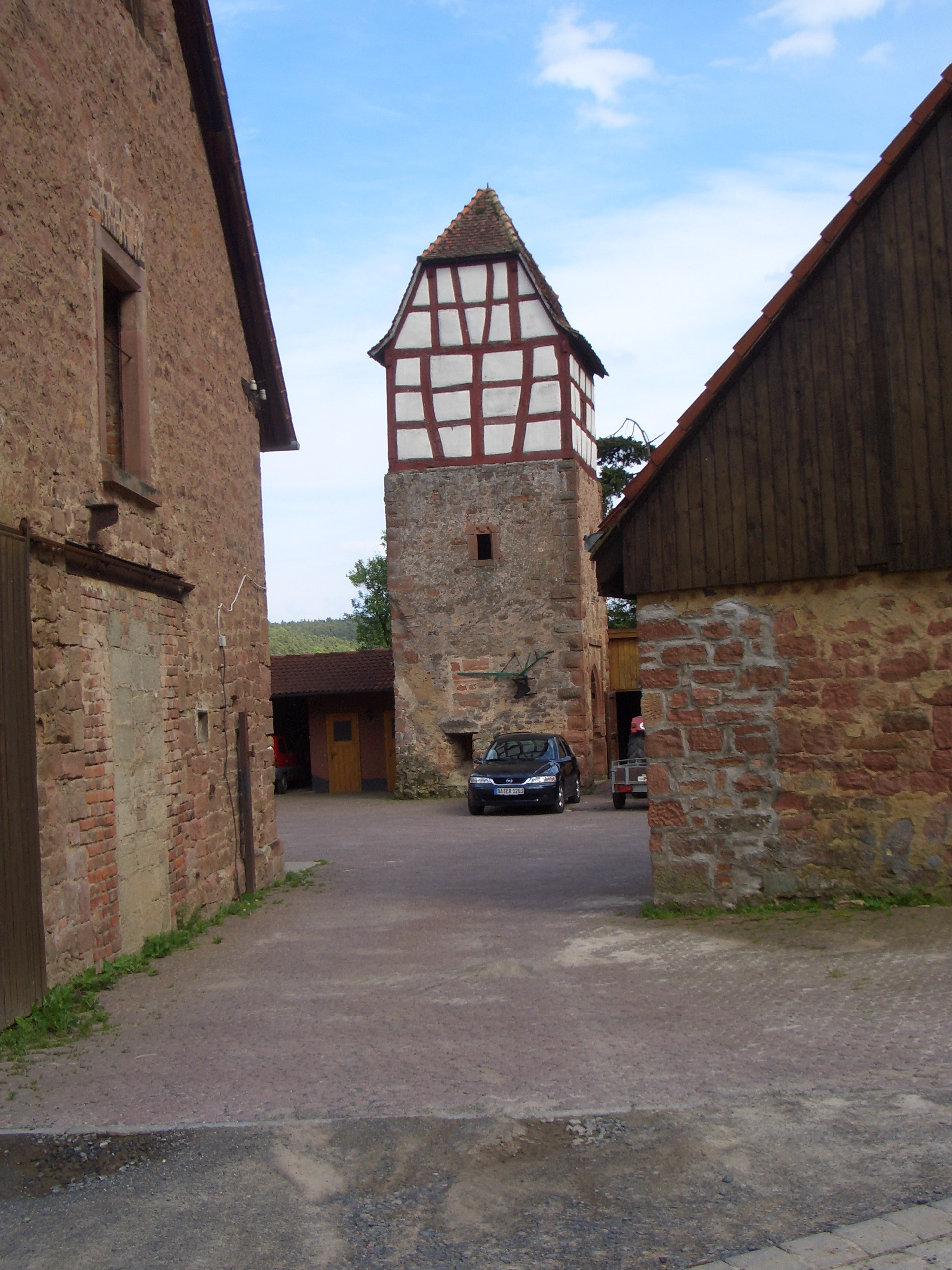 Wasserschloss in Schloß-Nauses